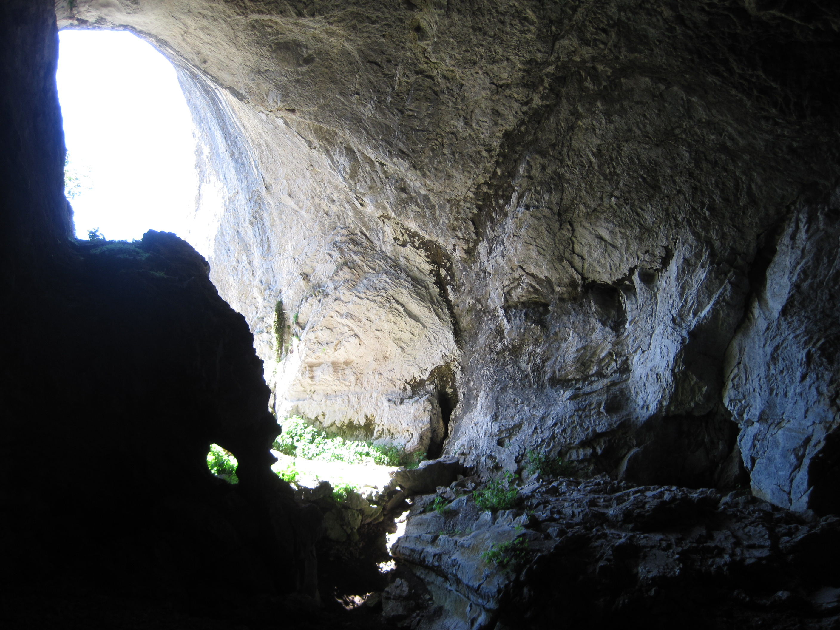 Interior de la cueva del Cobre, al norte de la provincia de Palencia (España).